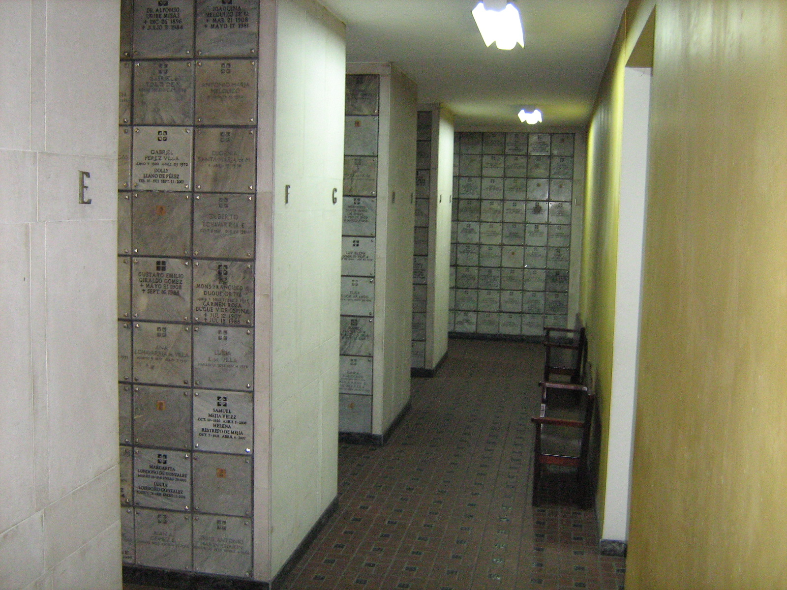 Galerías de osarios de la Catedral Metropolitana de Medellín. Colombia